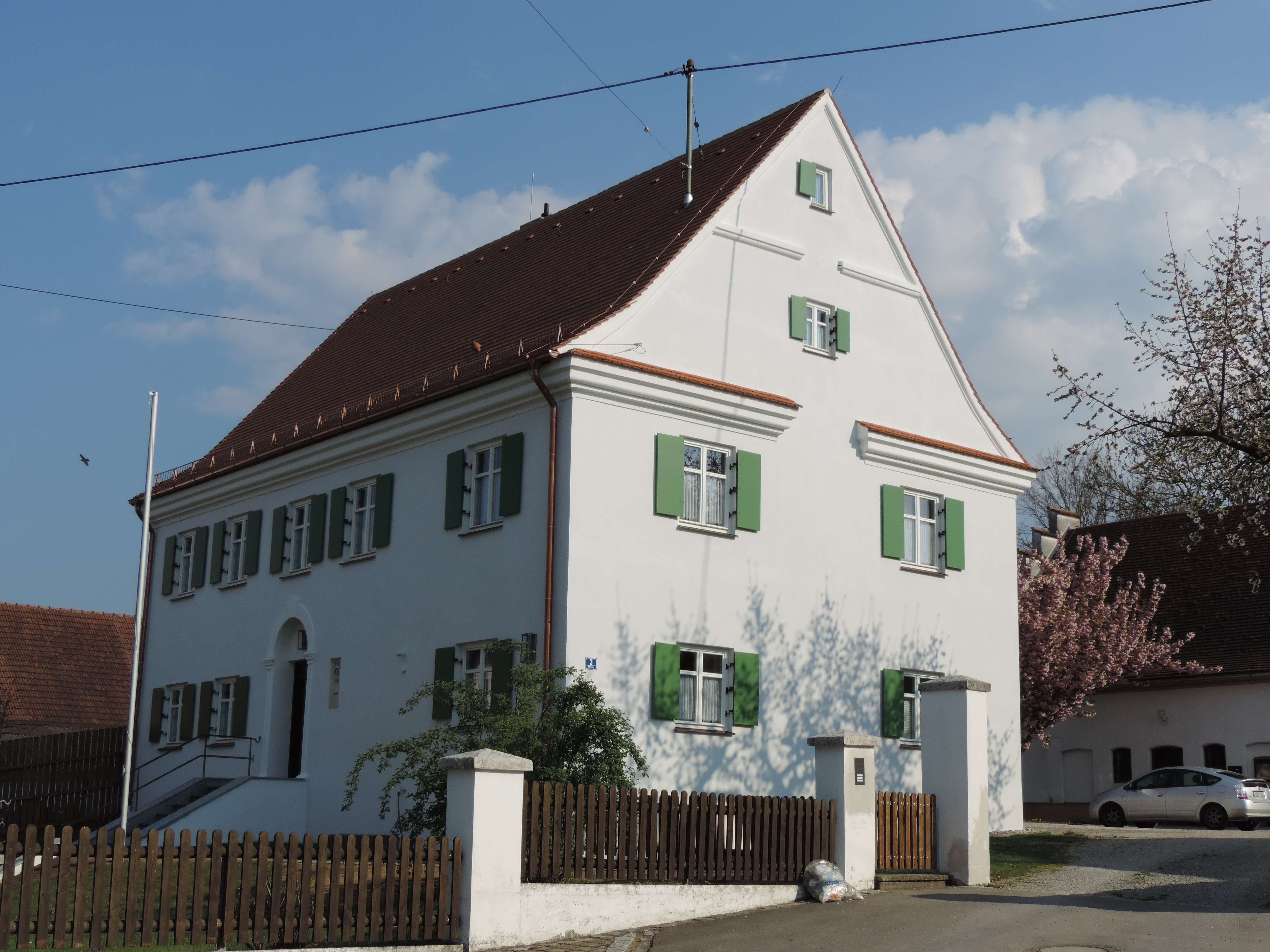 Pfarrhaus, Neubau nach Brand 1721, mit Satteldach und profiliertem Traufgesims; Pfarrstadel und Backhaus mit Treppengiebeln des 19. Jahrhunderts